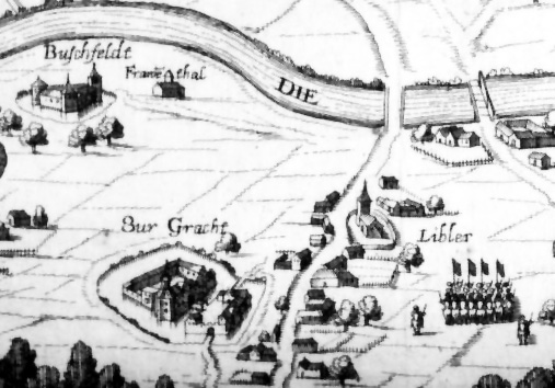 Burg zur Gracht 1642, Ausschnitt 1642, Ausschnitt nach Matthäus Merian d. Ä.